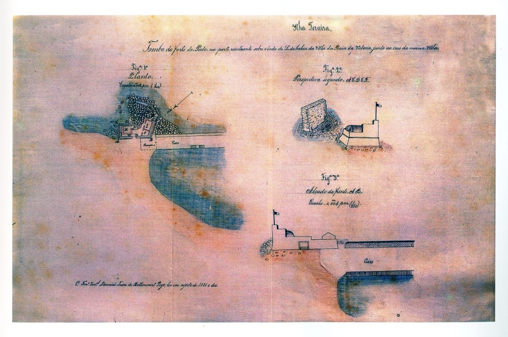 "Tombo do forte do Porto... na Villa da Praia...", Ilha Terceira (Açores), Portugal.